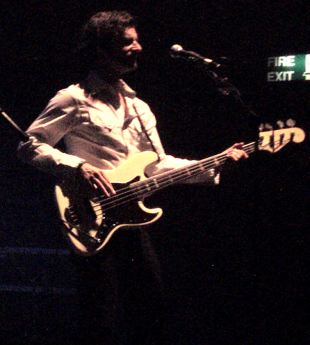 Arnulf Lindner performing live